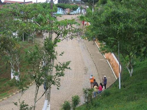 Avenida Presidente Medici